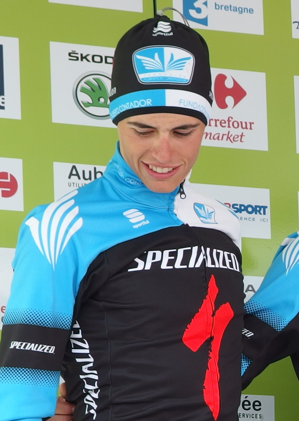 Tour de Bretagne 2014 - Présentation des équipes au départ de la sixième étape à Radenac - Équipe Specialized-Fundación Alberto Contador Depicted person: Enric Mas